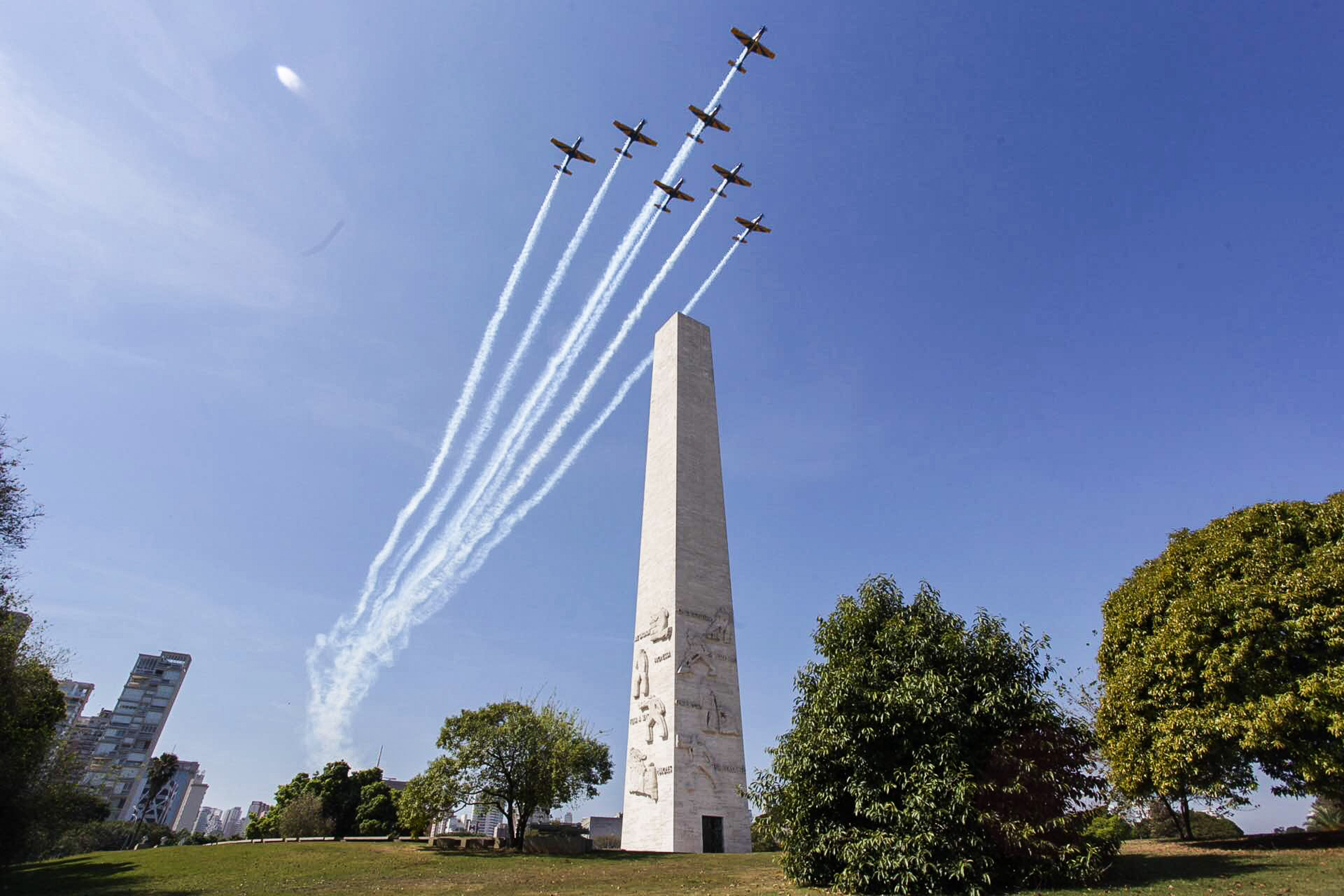 A cidade de São Paulo recebeu neste domingo (24) o revezamento da tocha olímpica. O percurso começou pouco antes das 8h, em frente ao Museu do Ipiranga, e percorreu pontos importantes da capital, como o Obelisco do Ibirapuera (Mausoléu ao Soldado Constitucionalista de 1932), Pinacoteca do Estado, Estação da Luz, Estádio do Pacaembu e o Memorial da América Latina. Foto: Diogo Moreira/ A2IMG